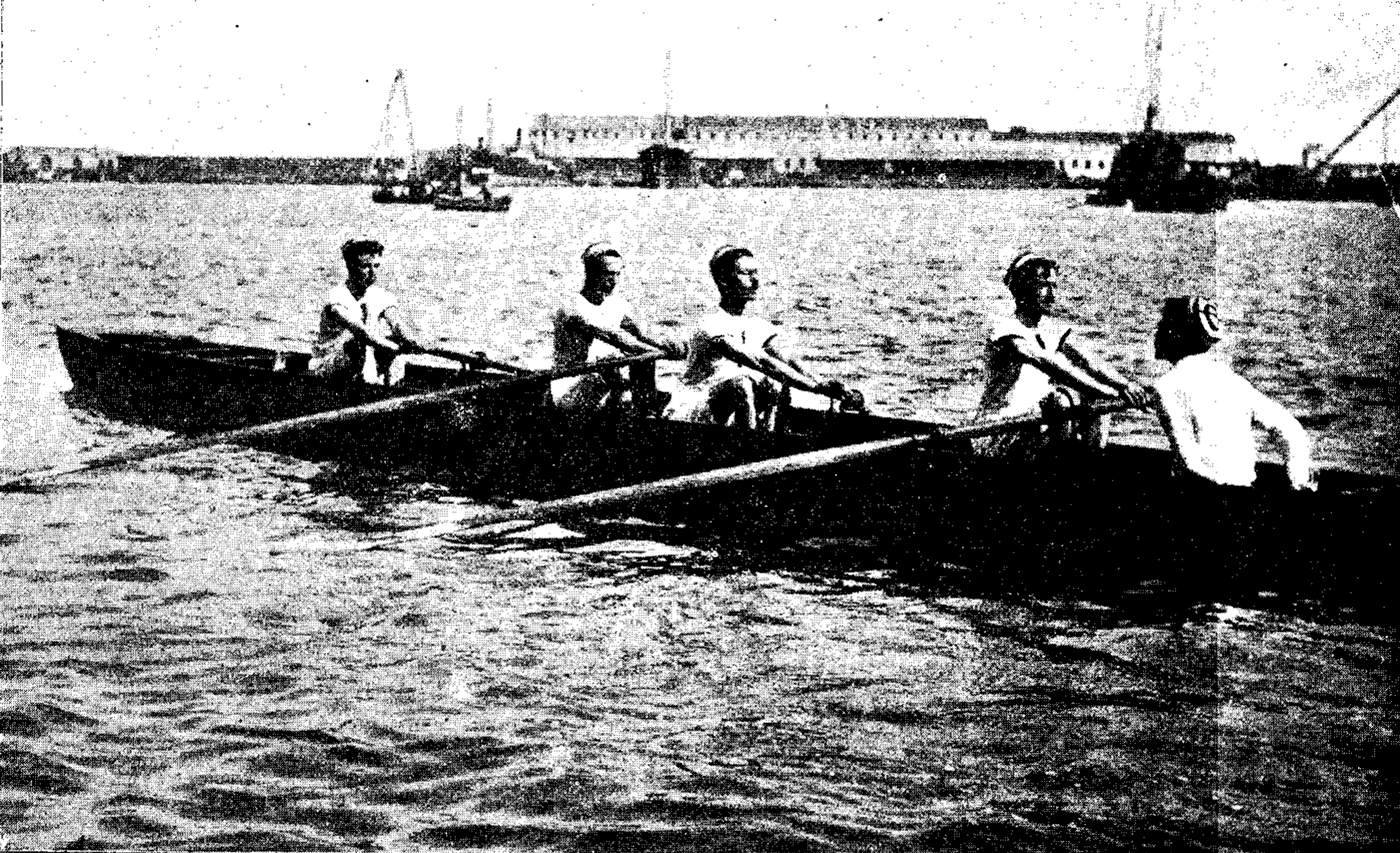 Yola «Catalunya» del Real Club de Regatas de Barcelona, en una regata disputada en San Sebastián en 1901. Tripulación de cuatro con timonel compuesta por José Formica-Corsi, Ricardo Margarit, Antonio Vela, Joan Camps y Orestes Quintana (timonel)